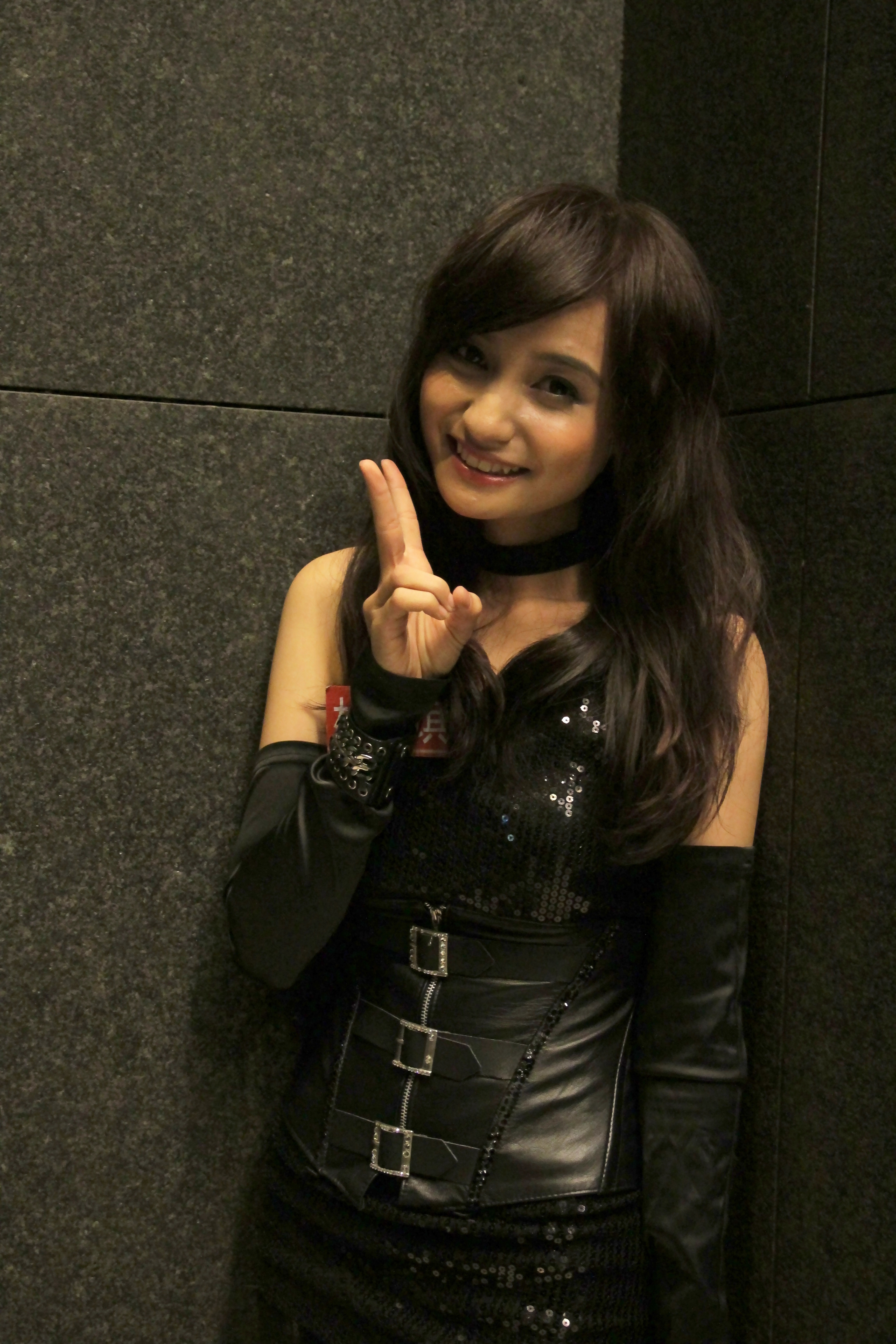 20121006 超偶錄影空檔拍攝